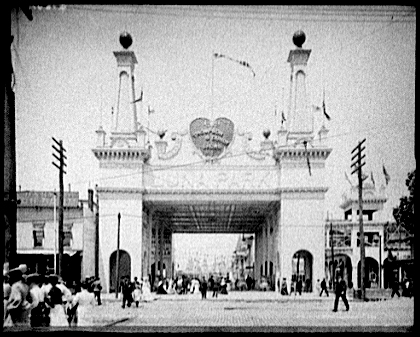 Eingangstor zum Lunapark-Vergnügungspark auf Coney Island, New York.